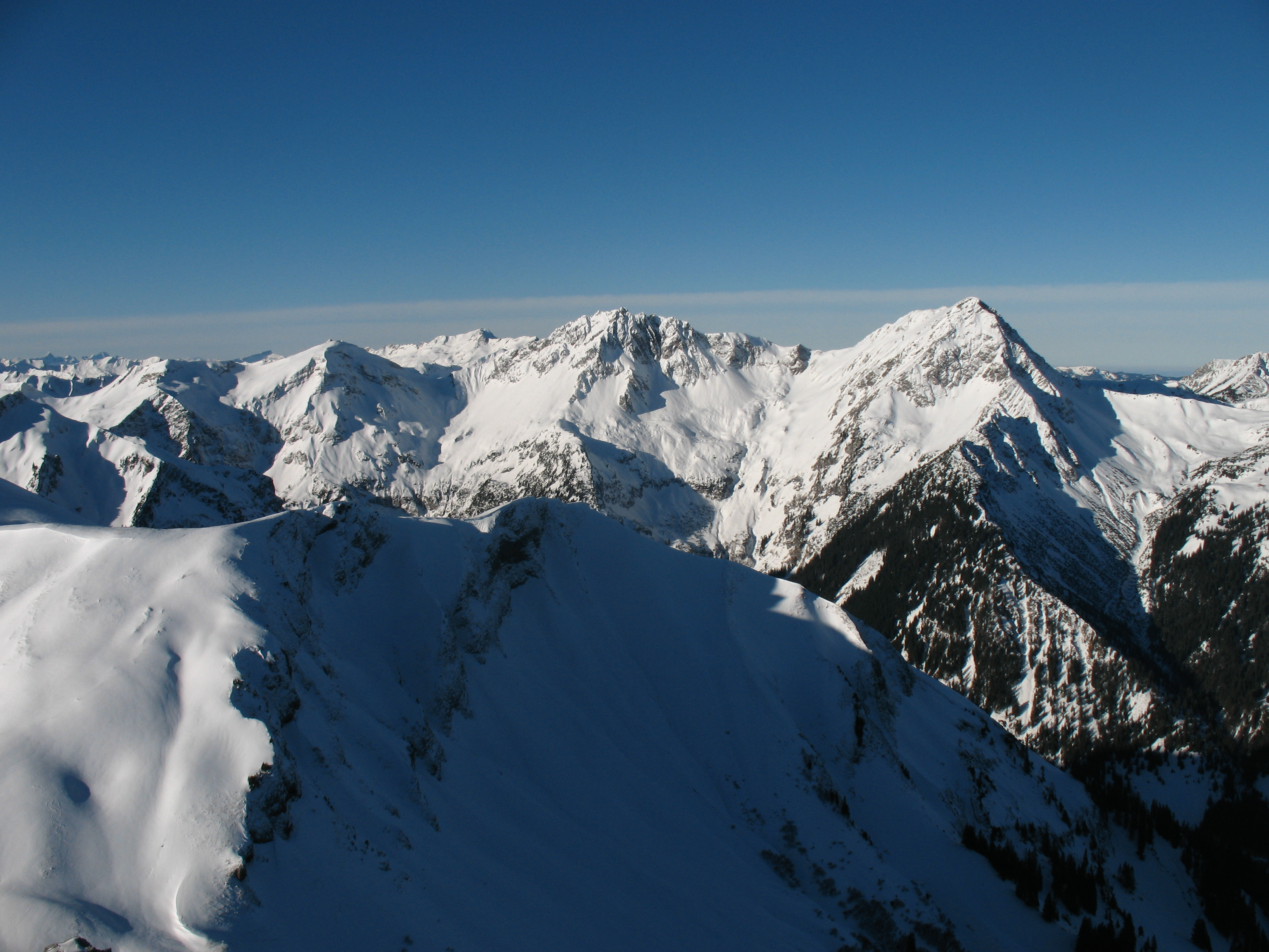 Blick von der Sulzspitze (2084 m) auf Knappenkopf, Kugelhorn (2126 m), Rauhhorn (2240 m), Gaishorn (2247 m). Im Hintergrund Hoher Ifen (2230 m), Hindelanger Klettersteig mit Großem Daumen (2280 m).